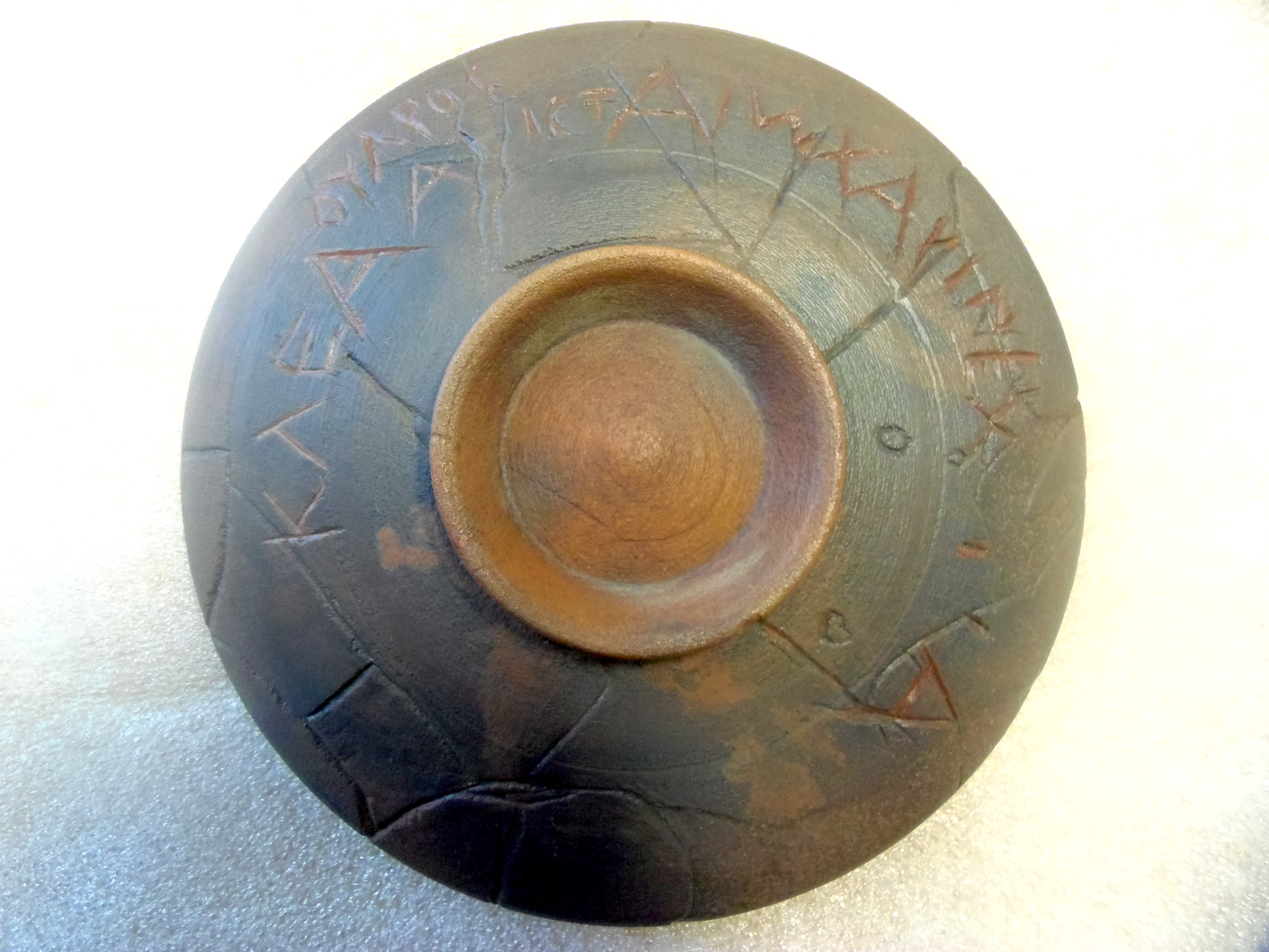 Vue dessous du fac-similé de la coupe dite de Klea, fille d'Oulis, portant l'inscription en grec "A Aristée, avec reconnaissance".